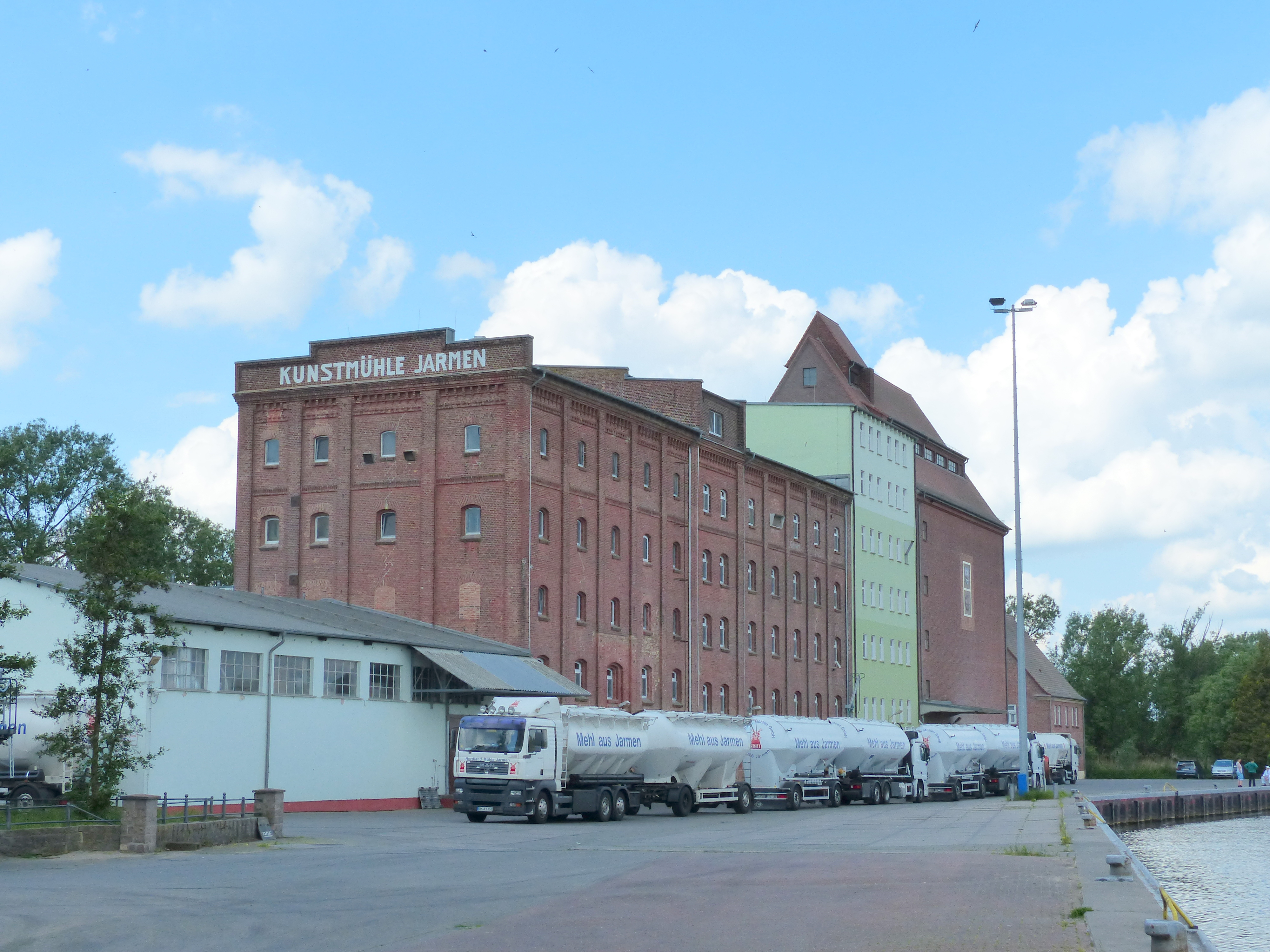 Kunstmühle Jarmen, Ansicht vom Peeneufer 2014